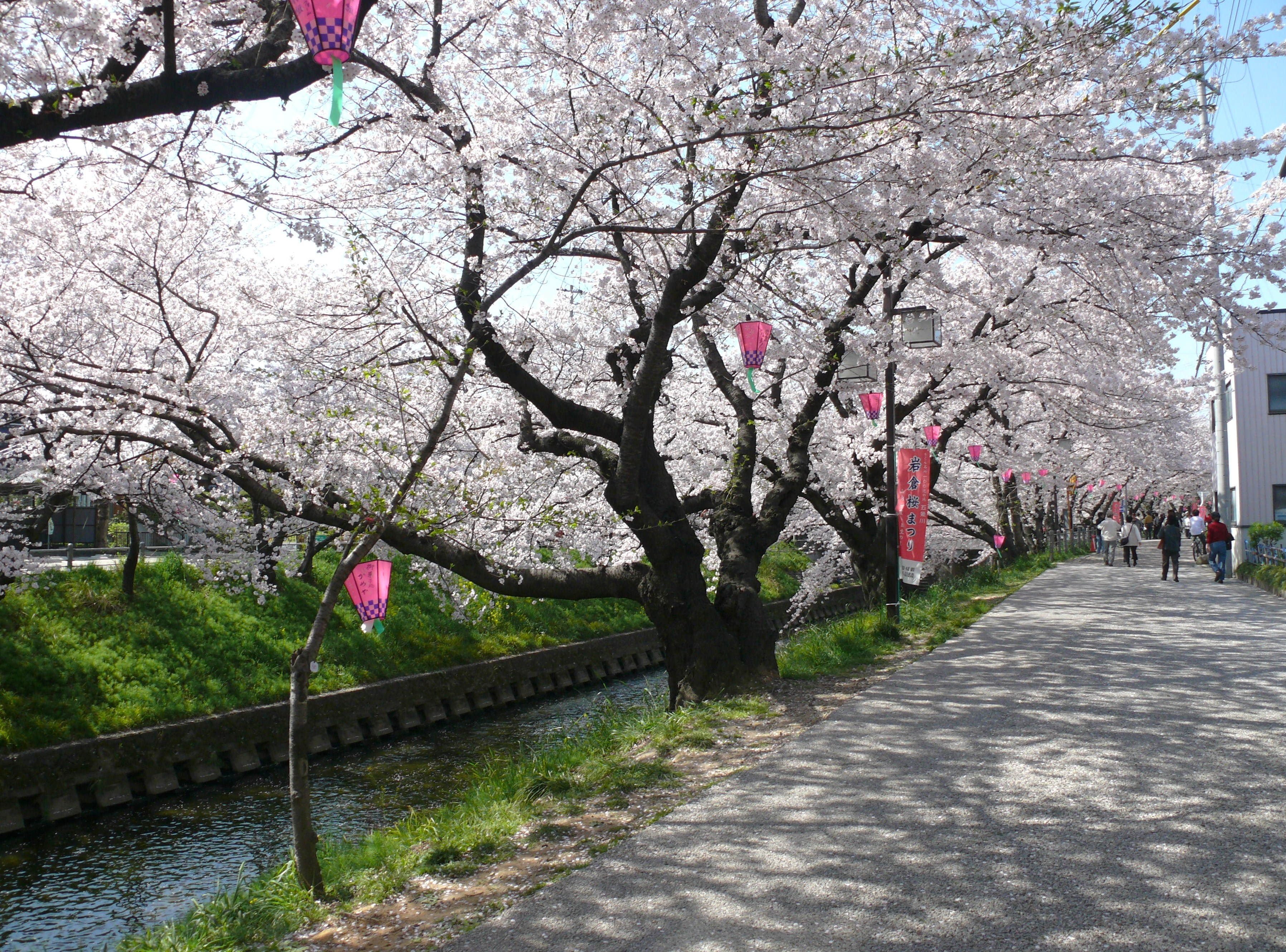 日本の愛知県岩倉市彦太橋付近の五条川